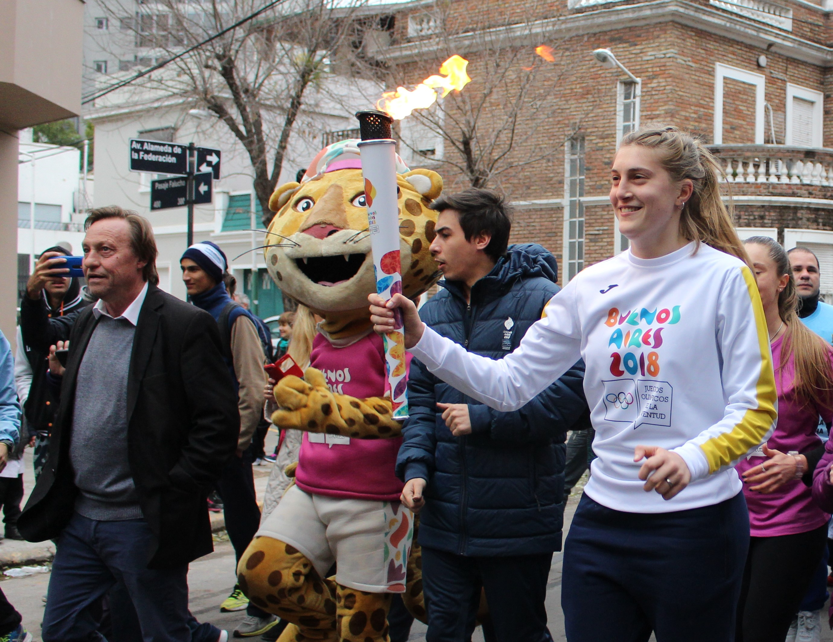 Relevo de la Antorcha Olímpica de los Juegos Olímpicos de la Juventud de Buenos Aires 2018 en la ciudad de Paraná, Entre Ríos. Luisina Desio